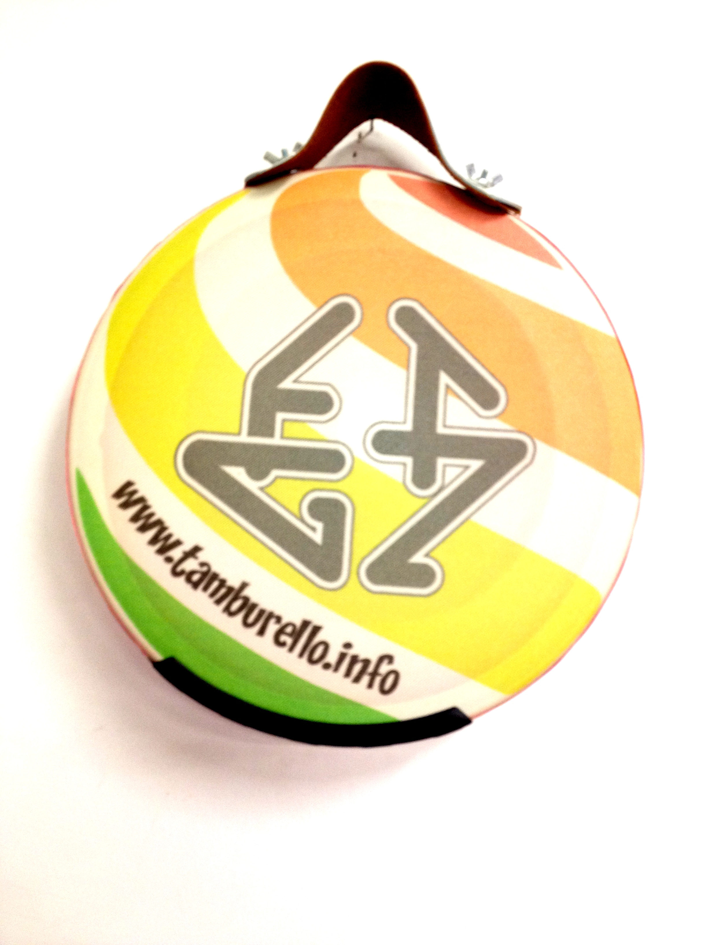 diametro cm 28 con maniglia